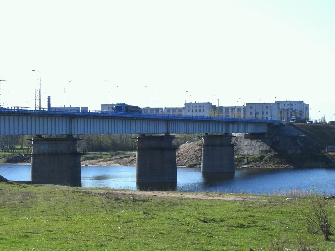 Мигаловский мост до реконструкции